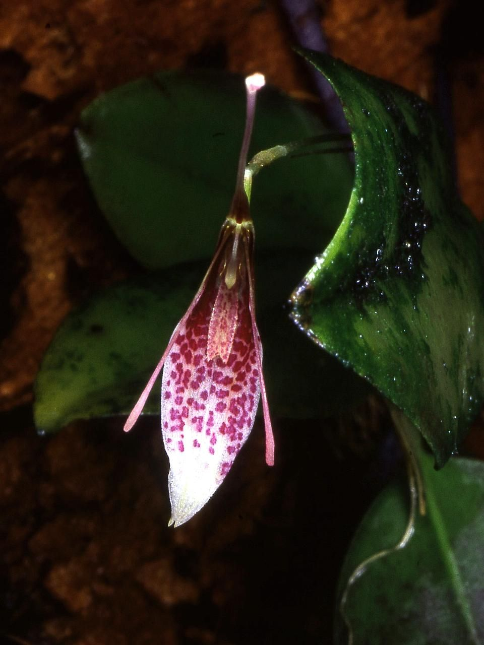 Restrepia lansbergii - flower